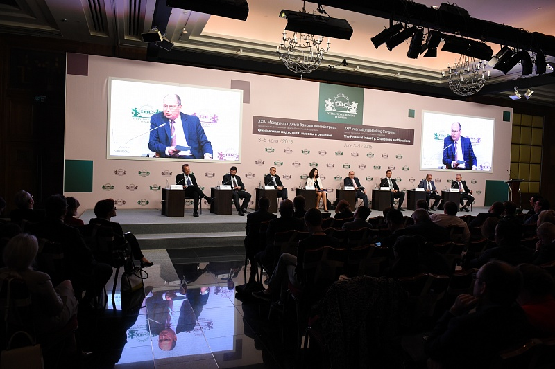 МБК-2015